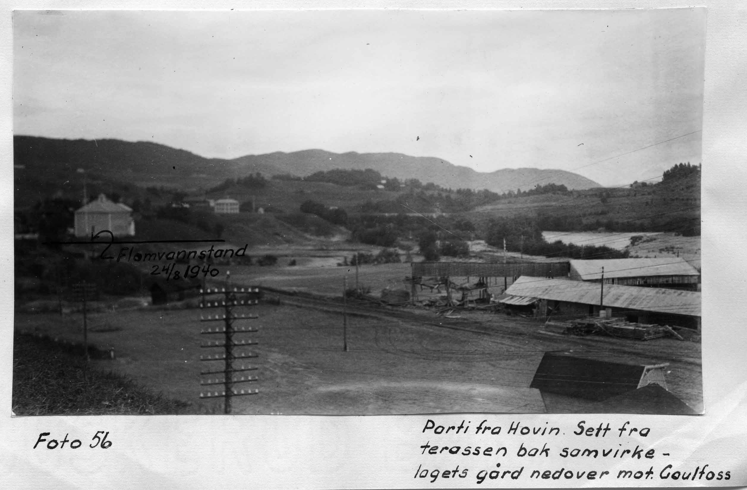 Image Note: Bildenotat: Parti fra Hovin. Sett fra terassen bak samvirkelagets gård nedover mot Gaulfoss. Date/Dato: 1940 Photographer/Fotograf: Olaf Strand Feel free to use the photos, but please make sure you attribute the photographer and mention NVE as the source. Bruk gjerne bildene, men vennligst oppgi fotografens navn og angi NVE som kilde. Format: Positive/Positiv Archive/Arkiv: NVE, Hydrologisk avdeling, Ea-30 Image ID/Bilde ID: NVE.H-fb_p-Flom Gaula-1940 nr.056.jpg